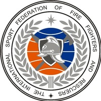 Эмблема Международной спортивной федерации пожарных и спасателей